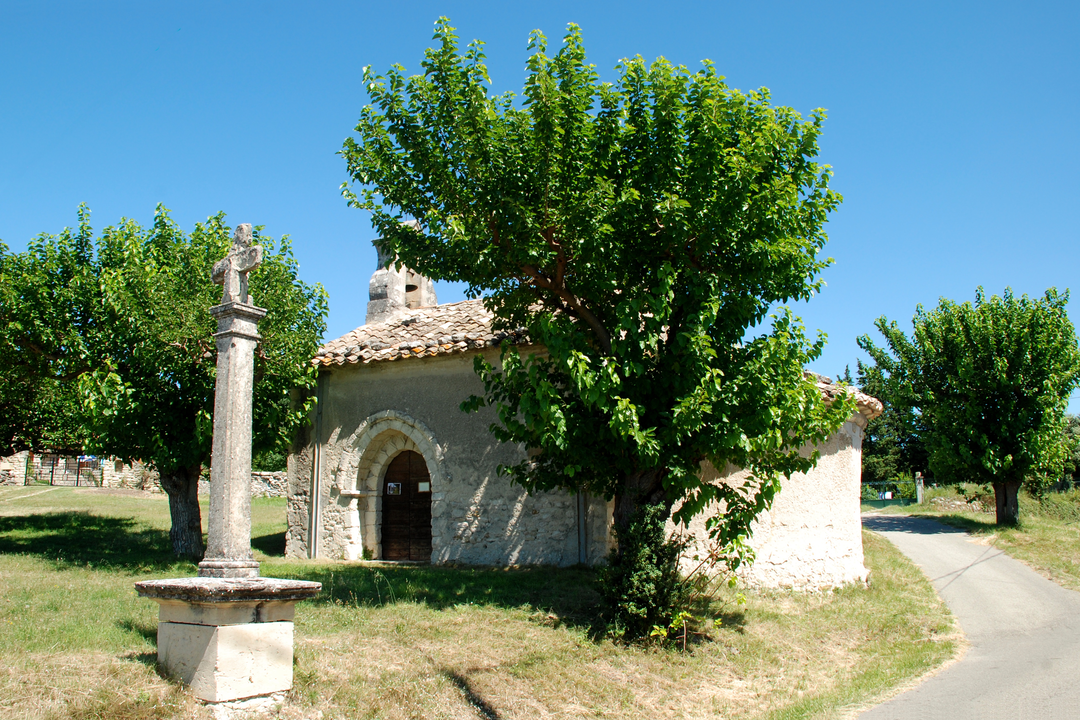 France - Drôme - Chapelle des Barquets